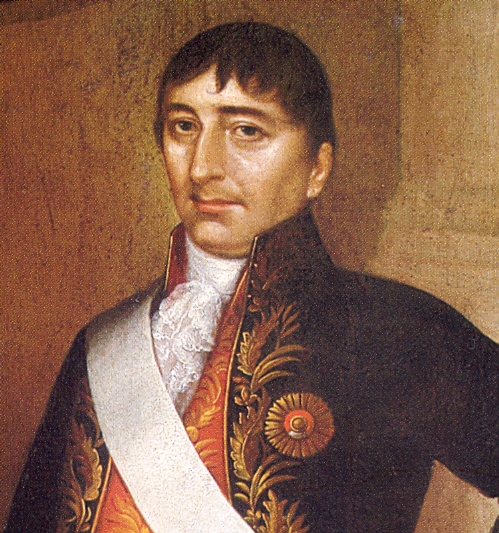 Retrato con la insignia de la Orden del Sol. Copia del original de José Gil de Castro